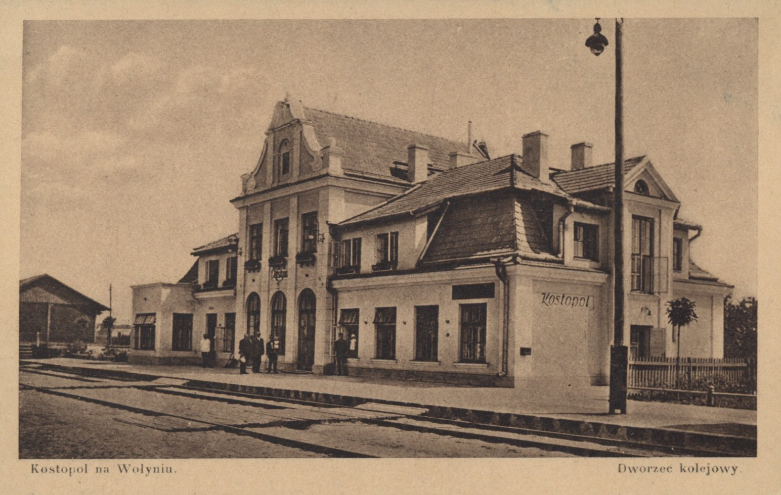 Поштівка видана Костопільським відділом Волинського товариства краєзнавчого і догляду за пам`ятками